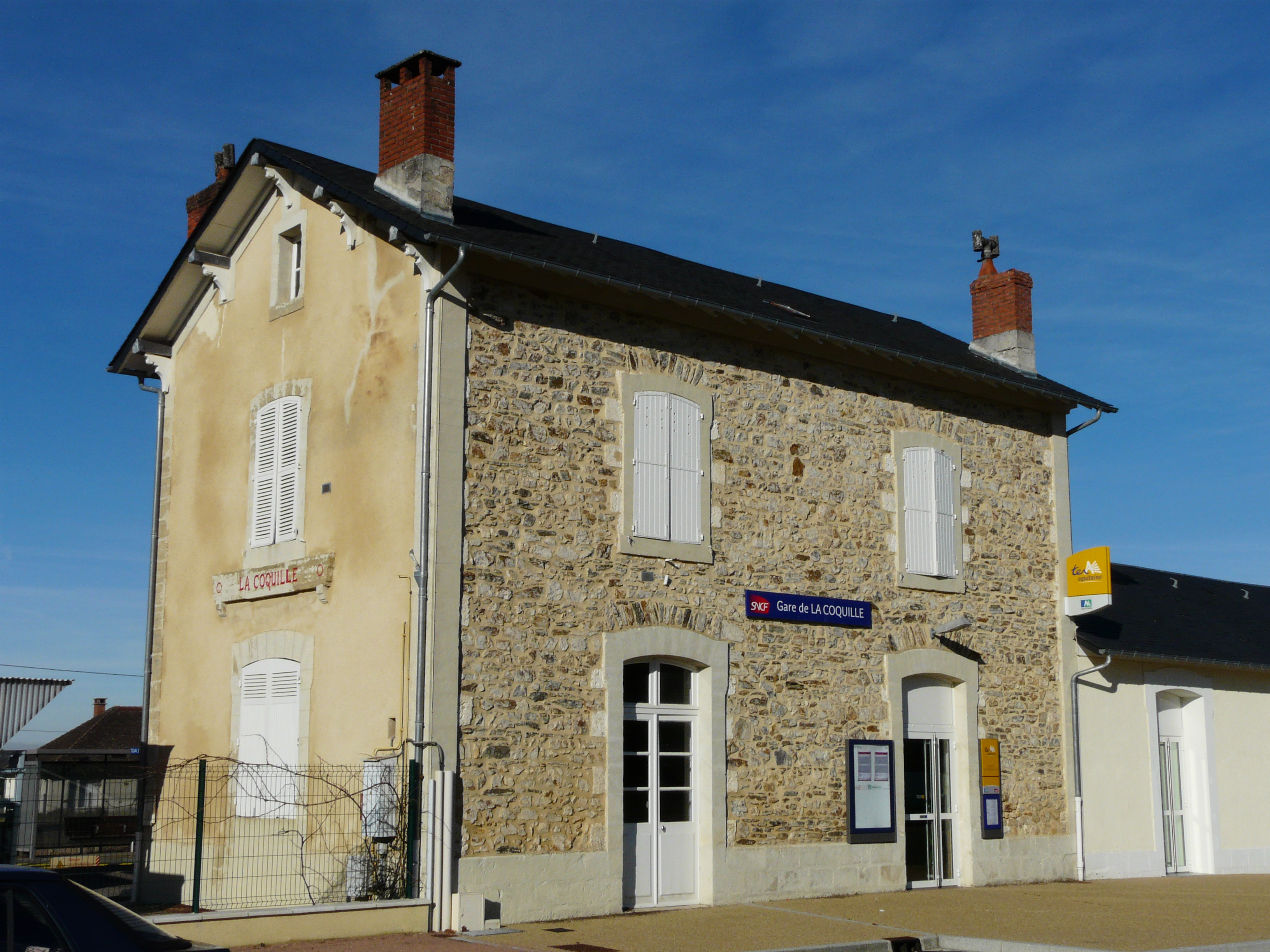 La gare de La Coquille, Dordogne, France.